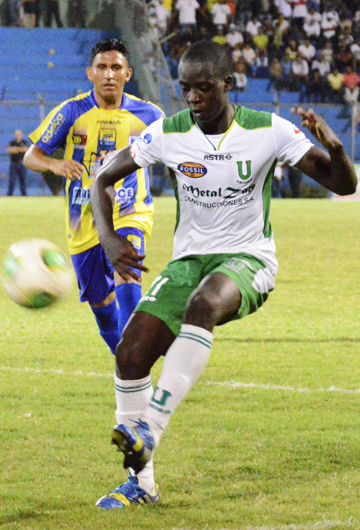 Orlin Quiñonez jugando para Liga de Portoviejo en el 2013